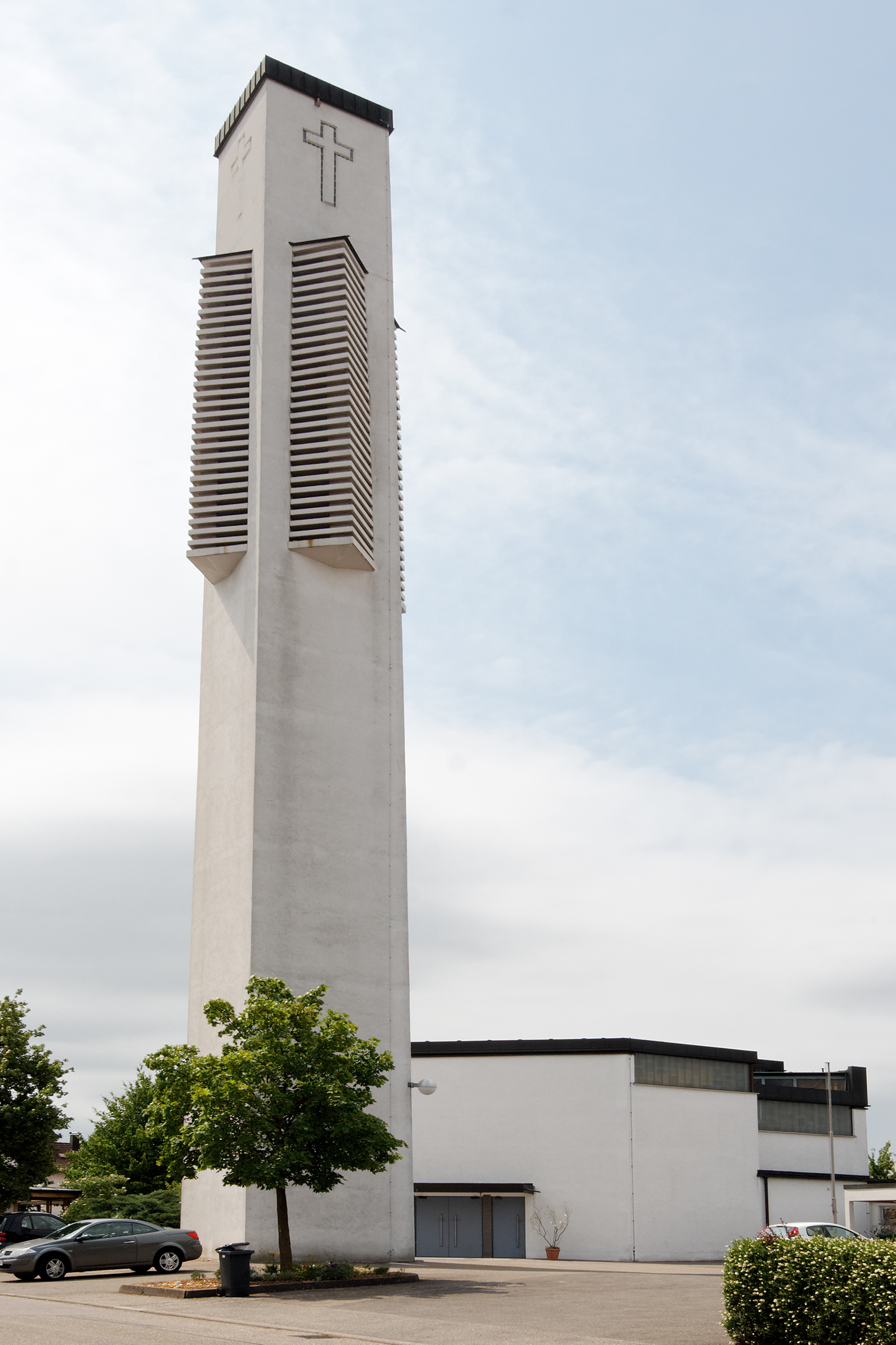 Katholische Kirche St. Raphael in Rutesheim (Baden-Württemberg), errichtet 1961/1962.